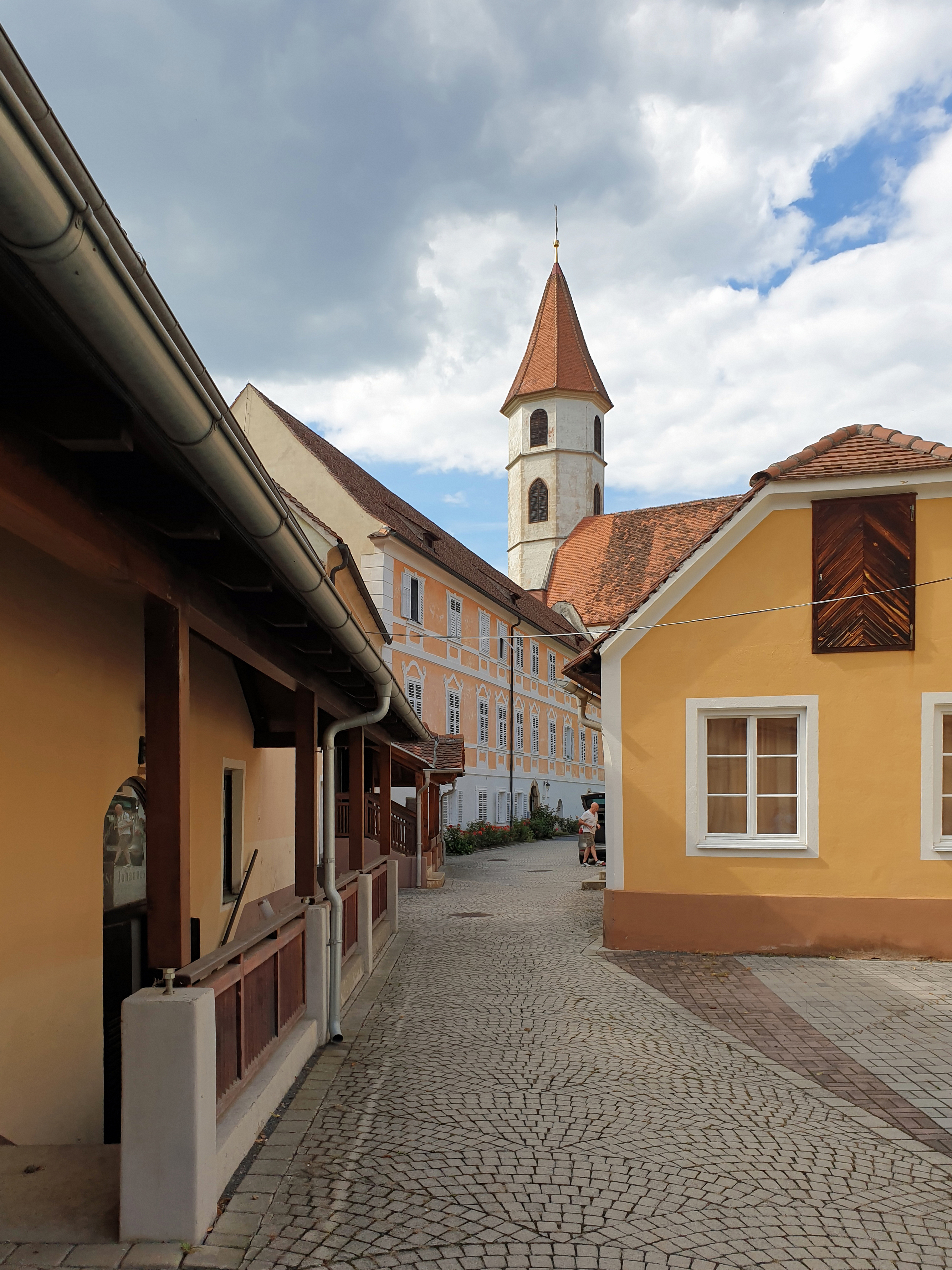 Dechanthofgasse mit dem Dechanthof und der Stadtpfarrkirche in Bad Radkersburg.